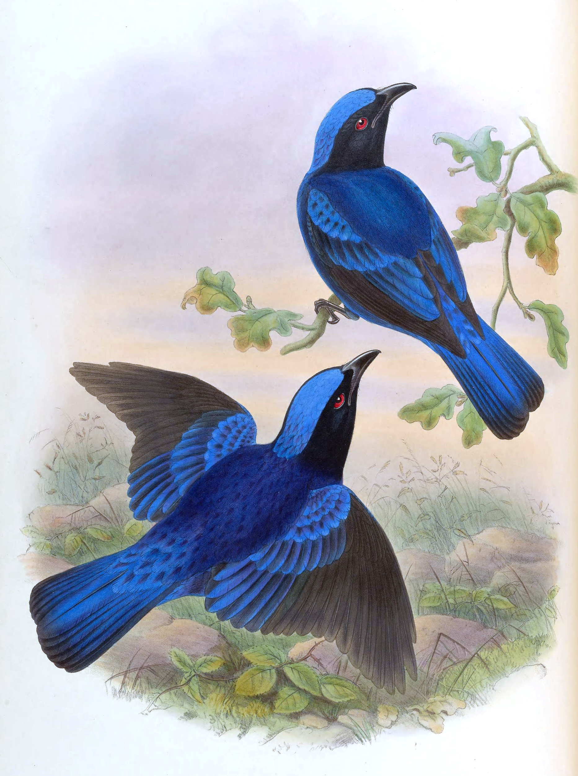 Irena cyanogastra